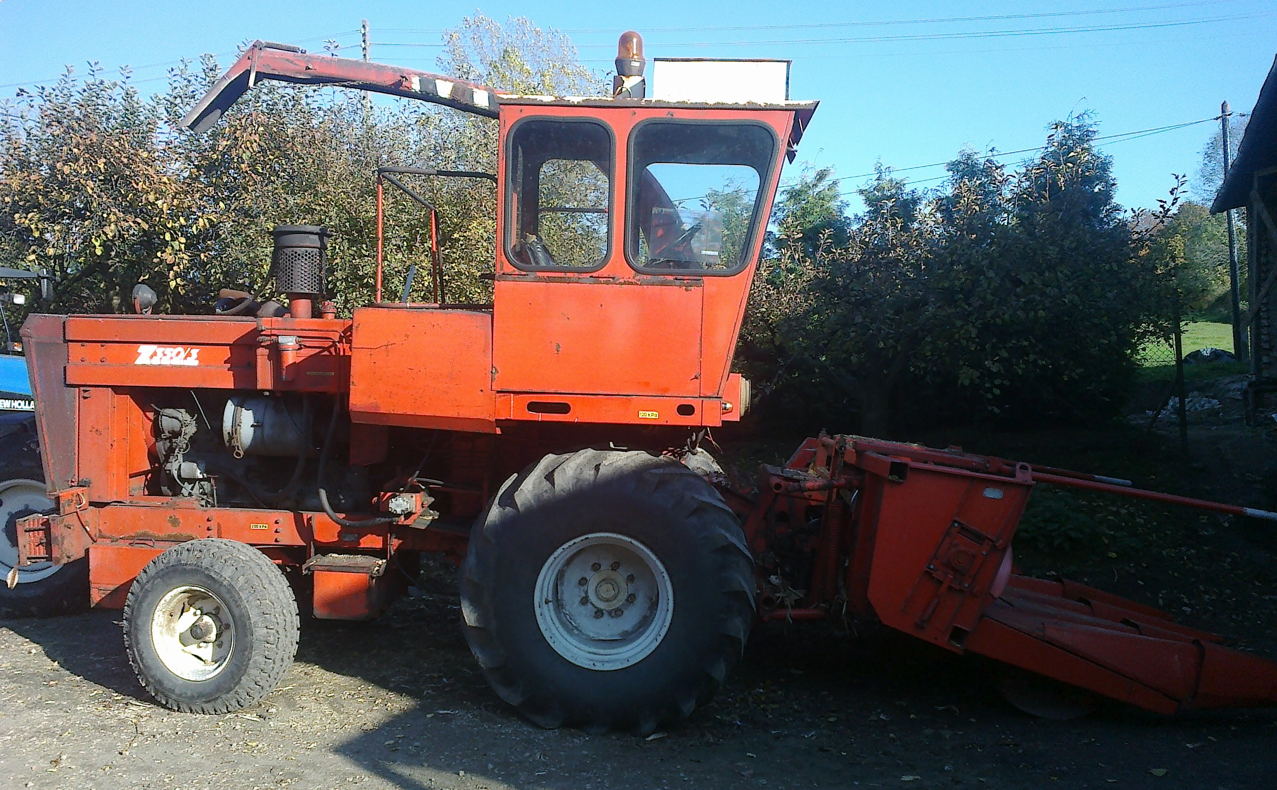 Sieczkarnia Z350/3 i Z344 - bok